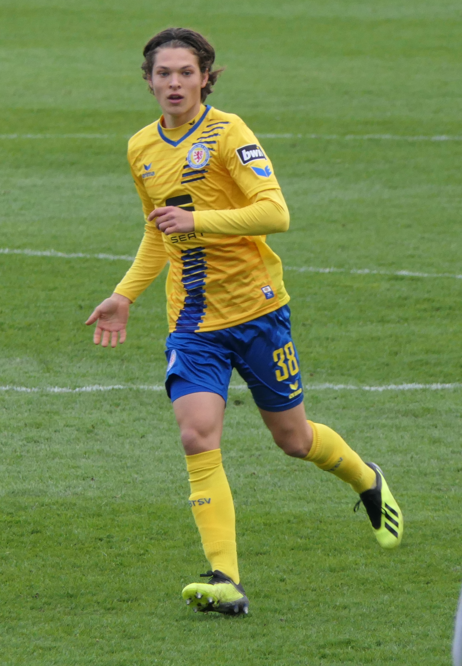 Der Fussballprofi Leon Bürger im Trikot von Eintracht Braunschweig beim Auswärtsspiel bei der SG Sonnenhof Großaspach am 03.11.2018.